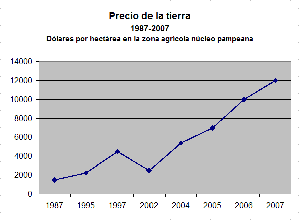 Cuadro. Evolución del precio de la tierra en Argentina (zona agrícola nucleo). 1987-2007. Chart. Evolution of the price of land in Argentina (nucleus agricuture zone).